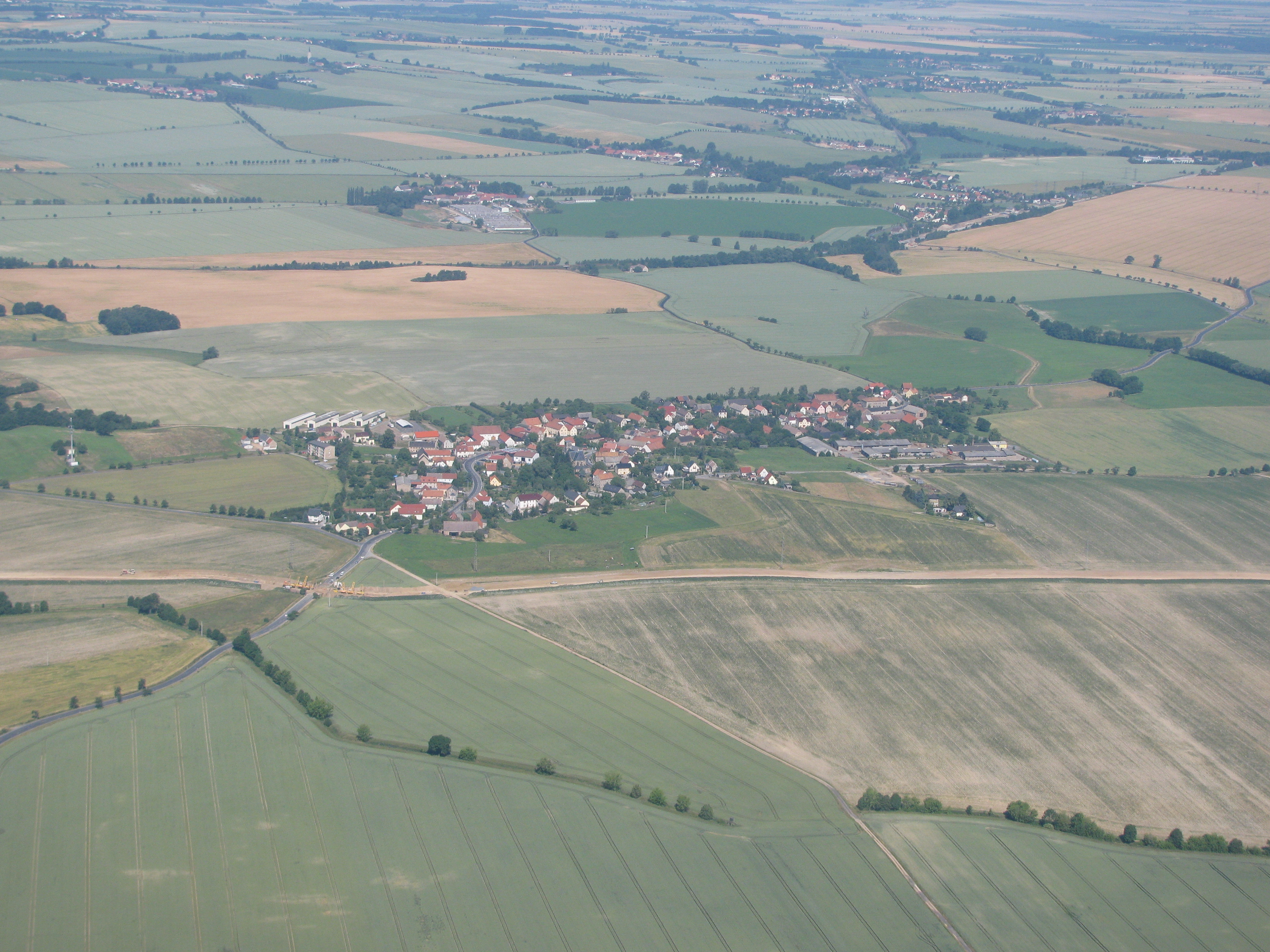 Luftbild Großdobritz, Niederau